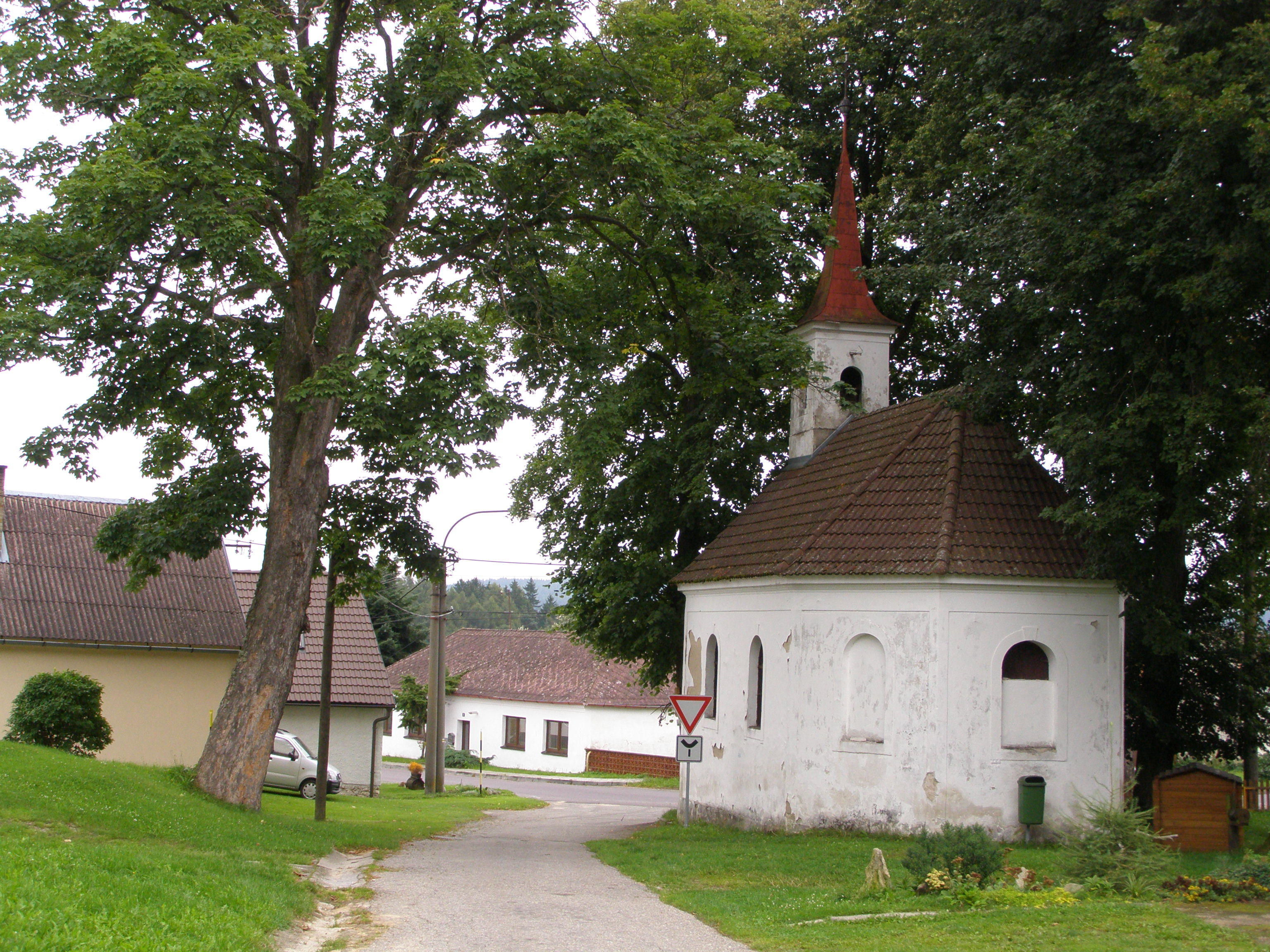 Dolní Bolíkov, kaple sv. Jana Nepomuckého